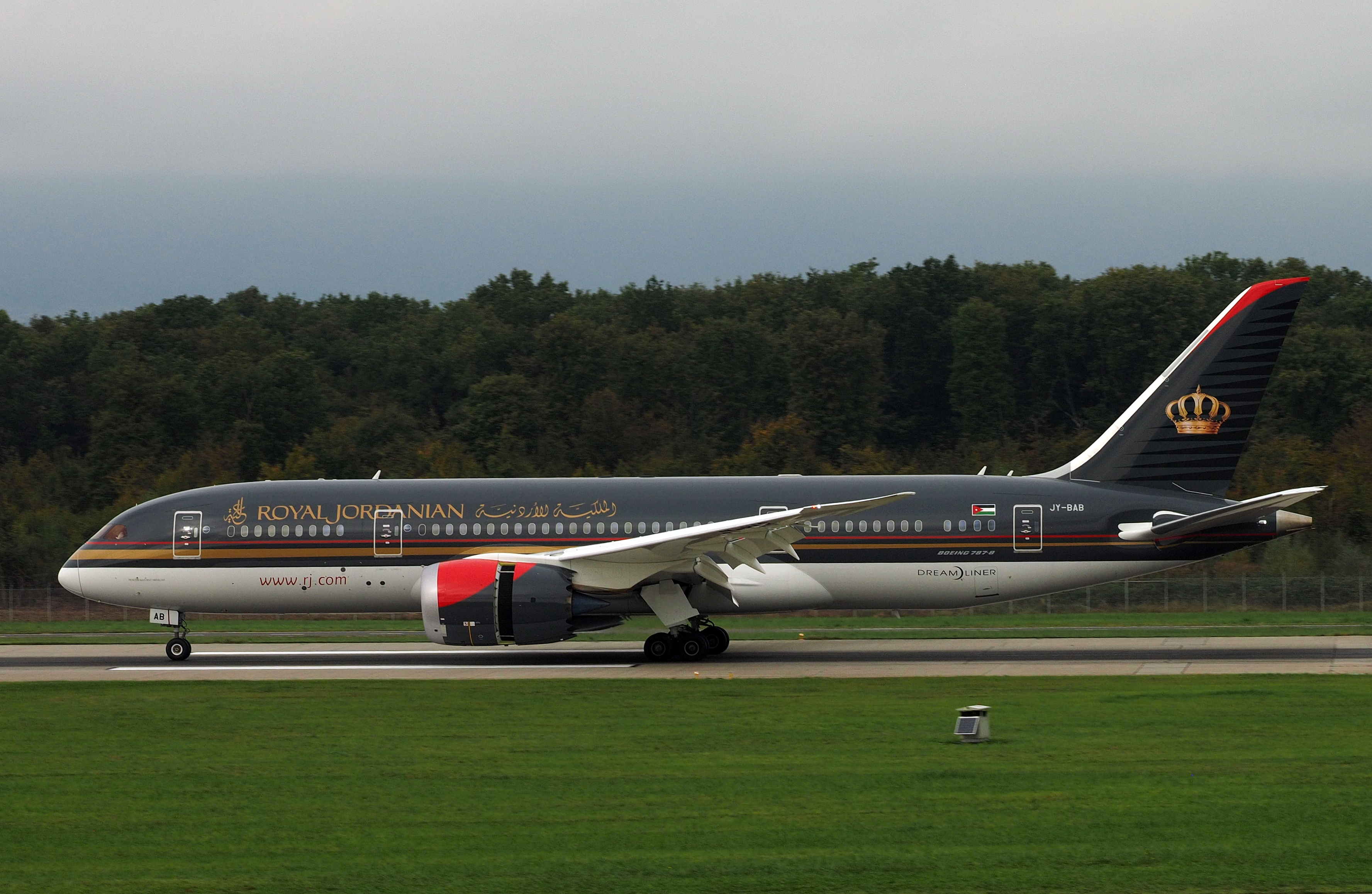 GVA 15.10.2014